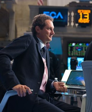 John Elkann a Wall Street, in occasione del debutto di FCA alla borsa americana (NYSE).